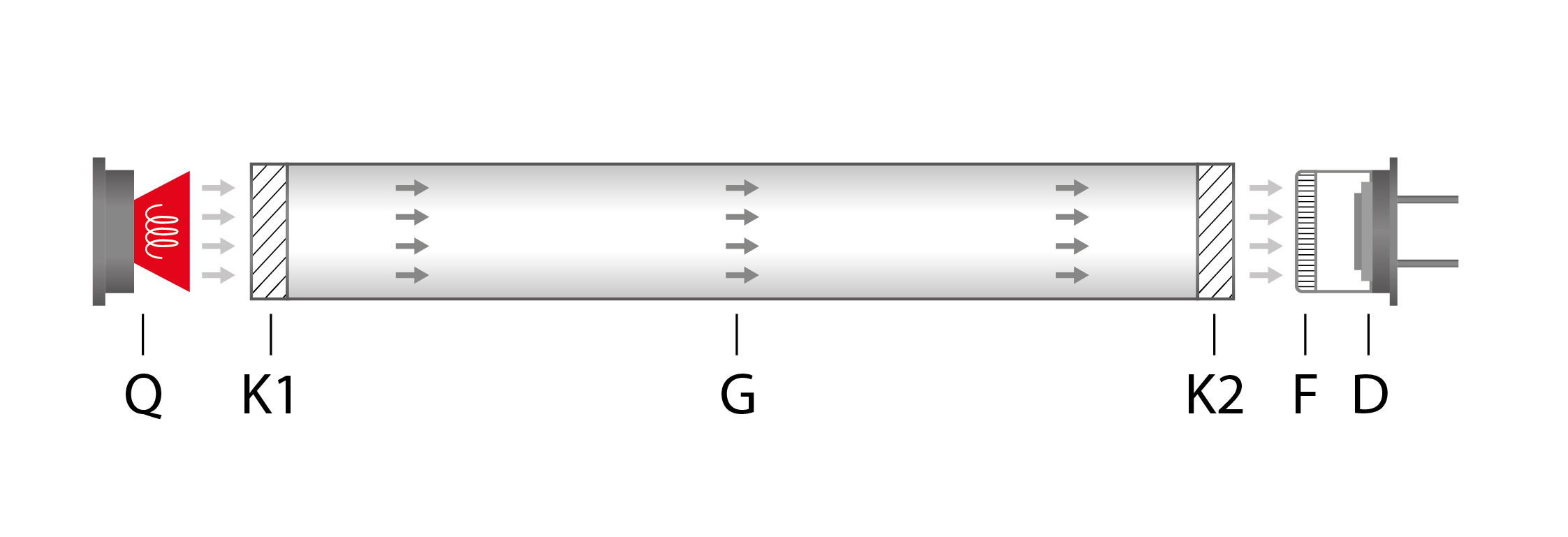 Transmissionsmessanordnung beim NDIR-Prinzip. Darin sind Q eine Infrarotstrahlungsquelle, K1 und K2 die Fenster der Gasküvette mit dem Gas G und D ein breitbandiger Infrarotdetektor mit einem optische Bandpassfilter F, passend für die Gasbande